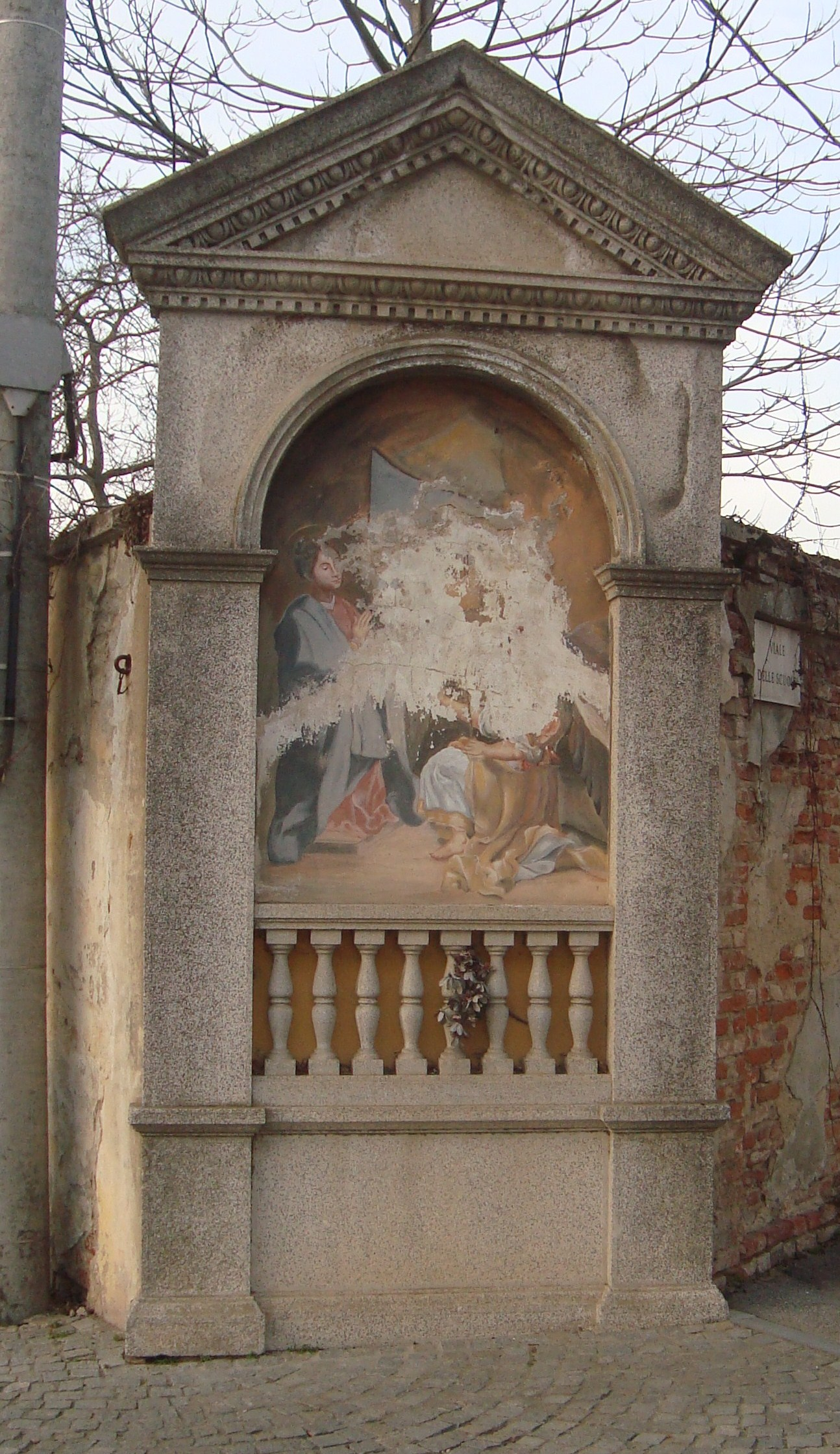 Pilone dedicato all'annunciazione - Sommariva Bosco - Provincia di Cuneo - Piemonte - Italia